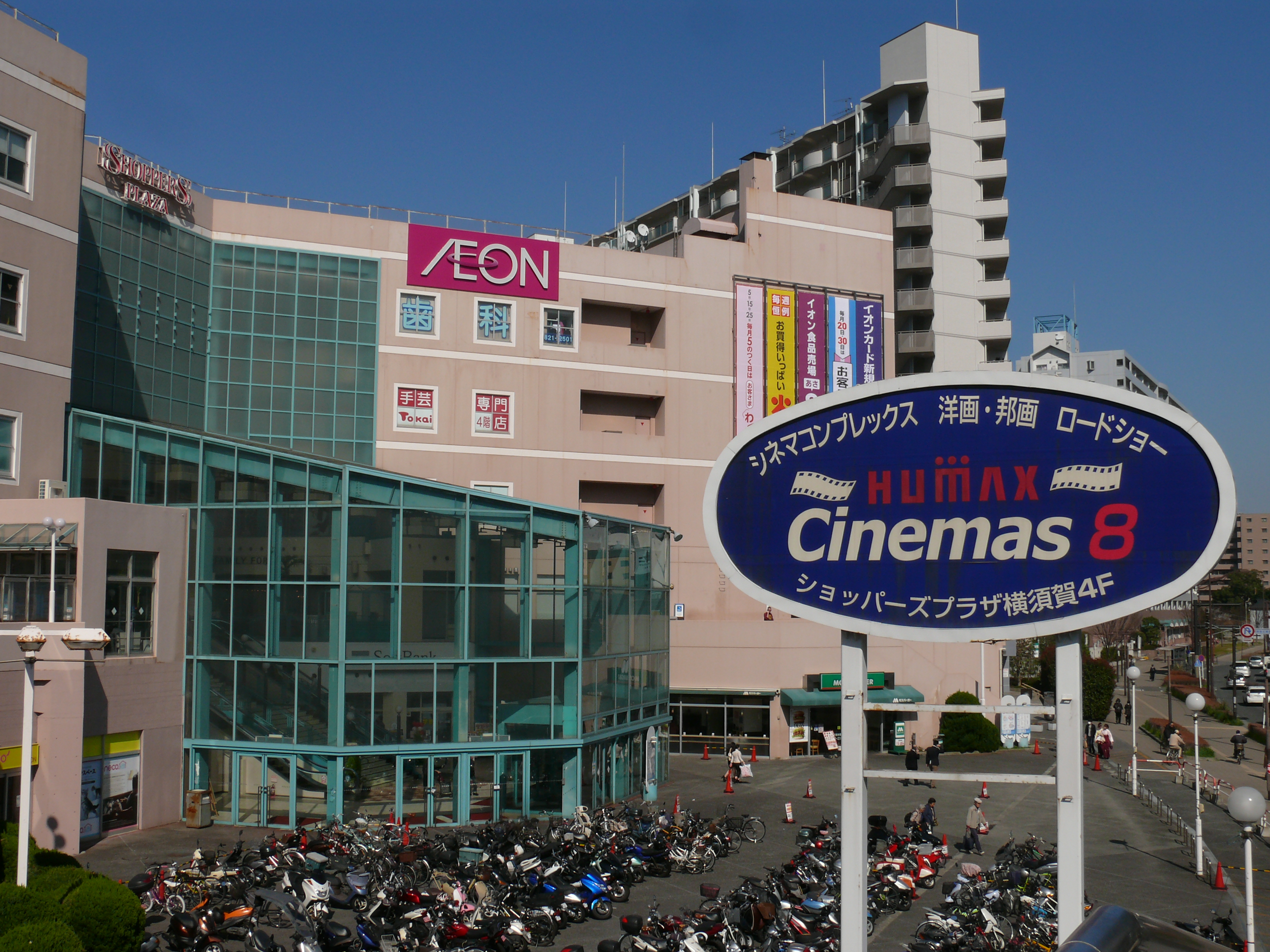 ショッパーズプラザ横須賀